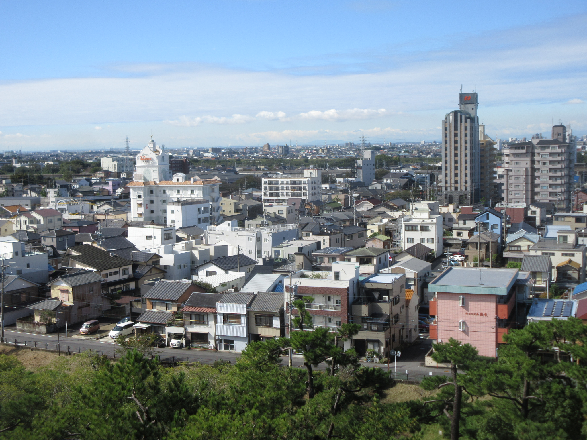 伊賀川沿いの岡崎市康生町の町並み